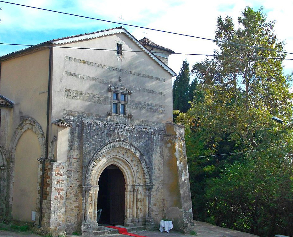 Abbazia della Sambucina This is a photo of a monument which is part of cultural heritage of Italy.